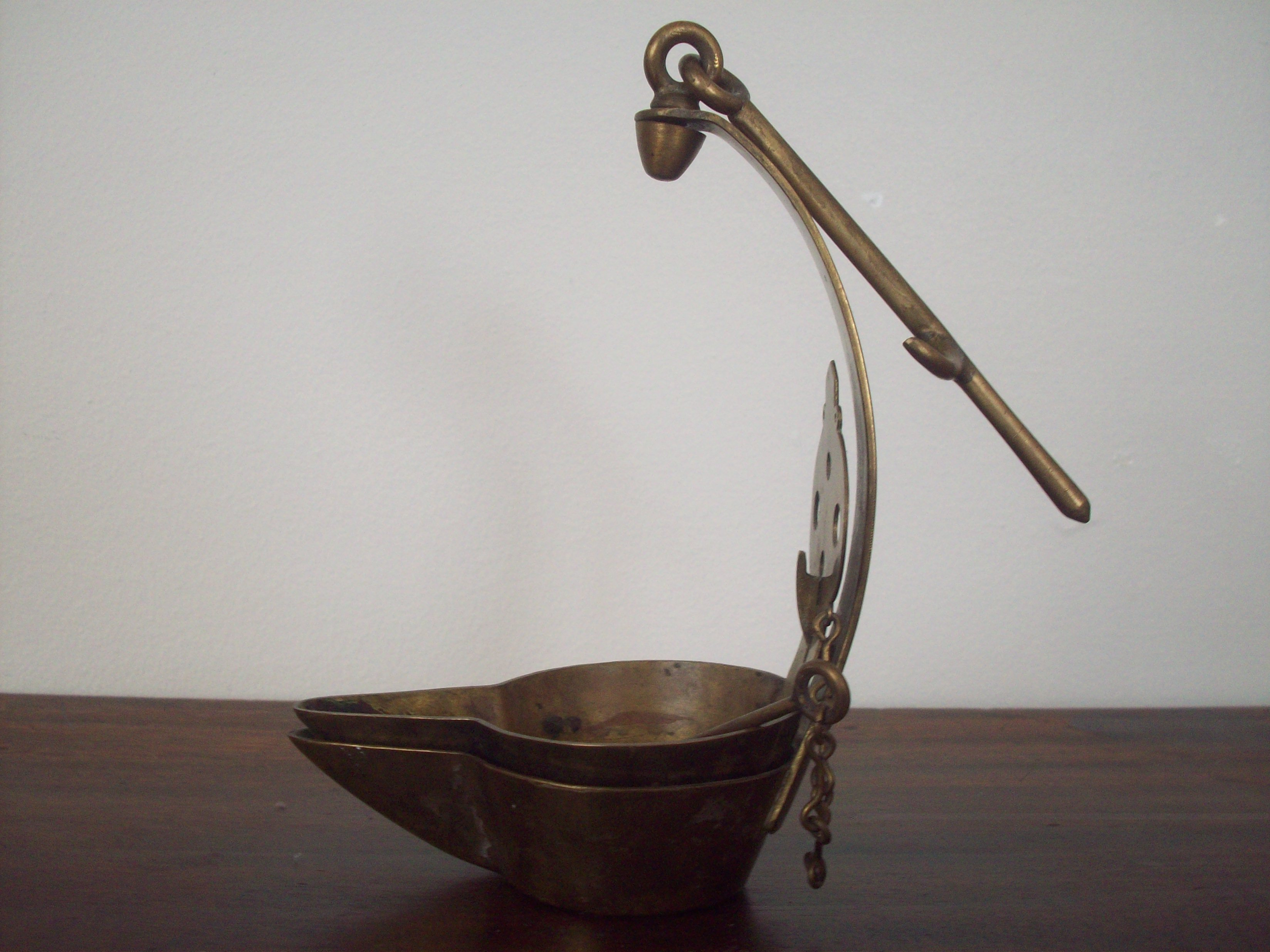 Lýsislampi